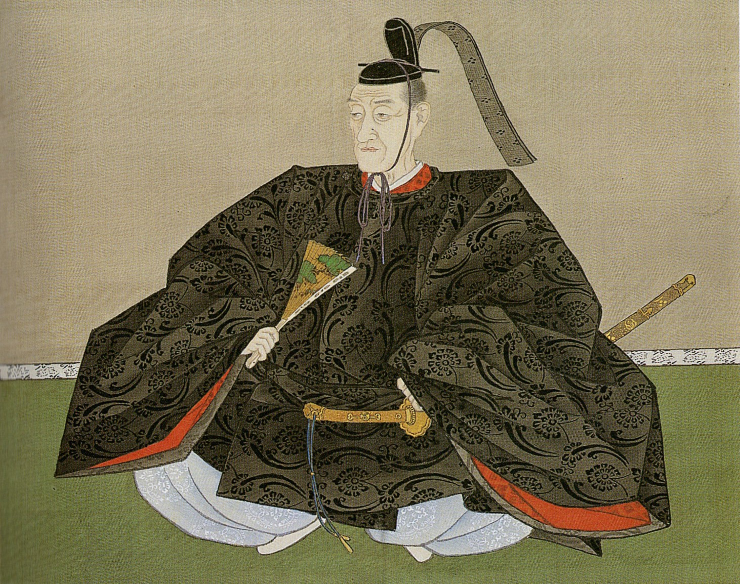 徳山藩主・毛利元蕃の肖像画。